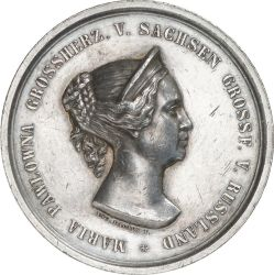 Medaille 1854 zum 50jährigen Jubiläum des segensreichen Wirkens seiner Tochter Maria Pawlowna in Sachsen-Weimar -Eisenach. Kopf r. / Schrift zwischen geflochtenen Zweigen unter Stern. 55 mm. 72,98 g. Diakov 611. Merseburger 4041. Anfertigung von Angelica Facius (Weimar).